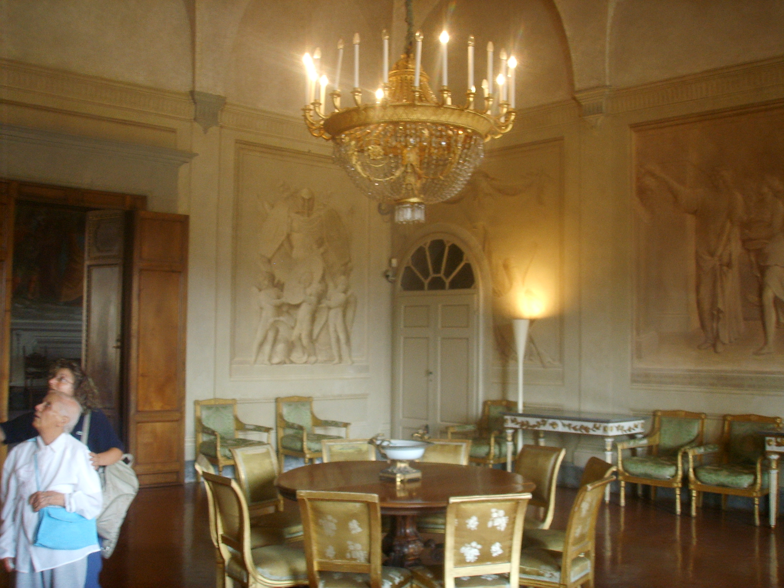 Villa medicea di Poggio a Caiano, inside entrance hall on the first floor in Poggio a Caiano, Italy